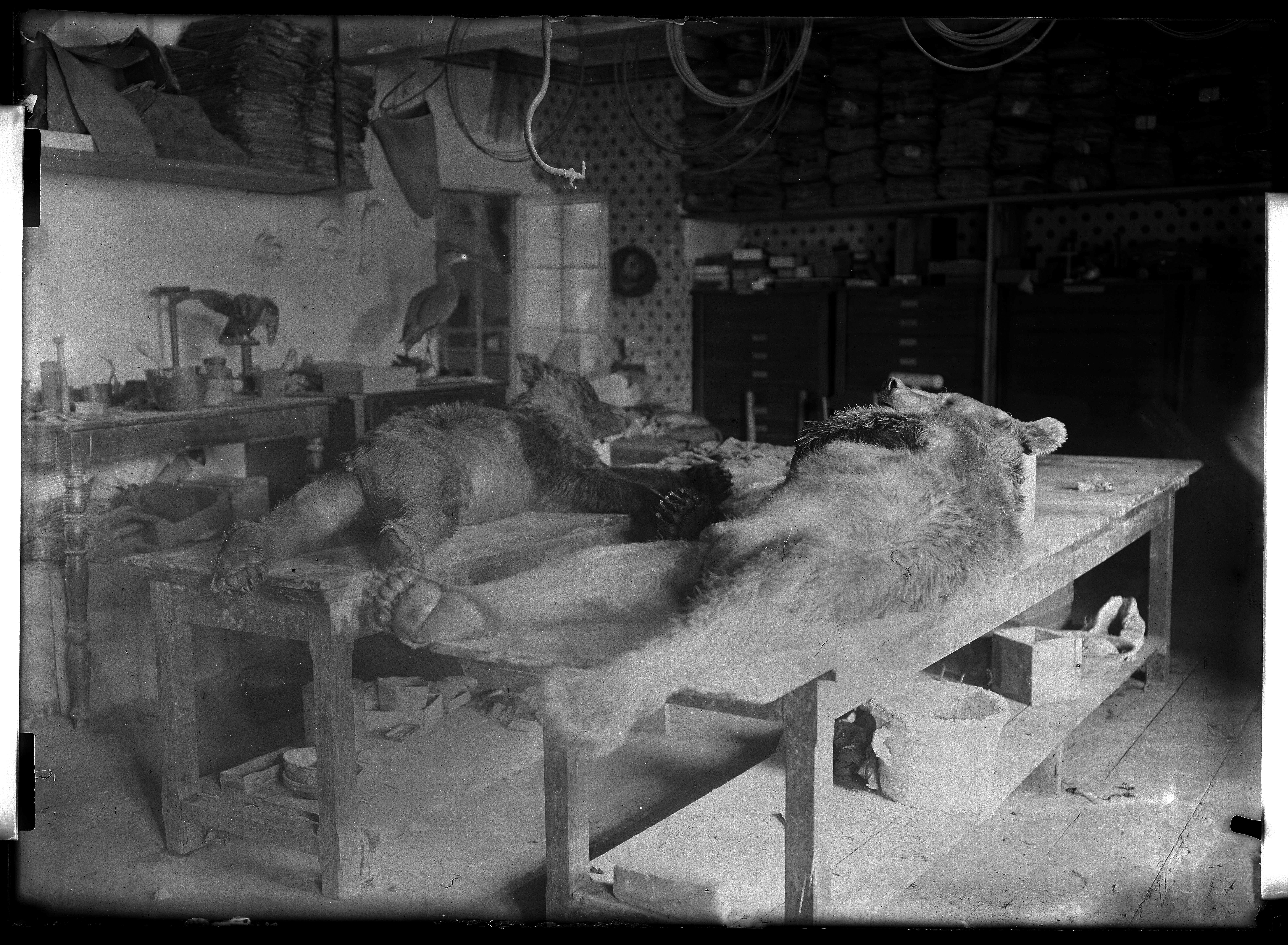 plaque négative au gélatino-bromure d'argent format 13x18cm. inscription manuscrite par Eugène Trutat sur enveloppe : "Musée : les ours sur la table"